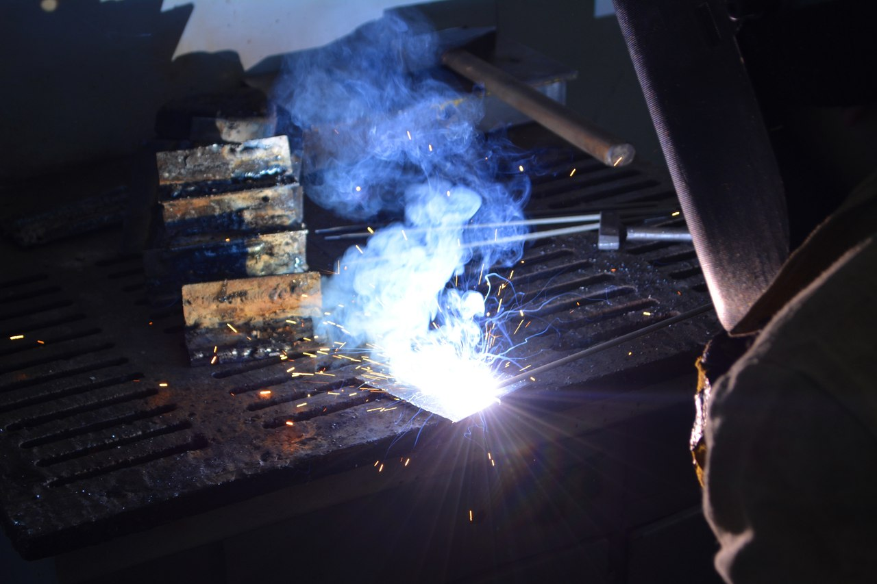 вчилище Моторобудівник